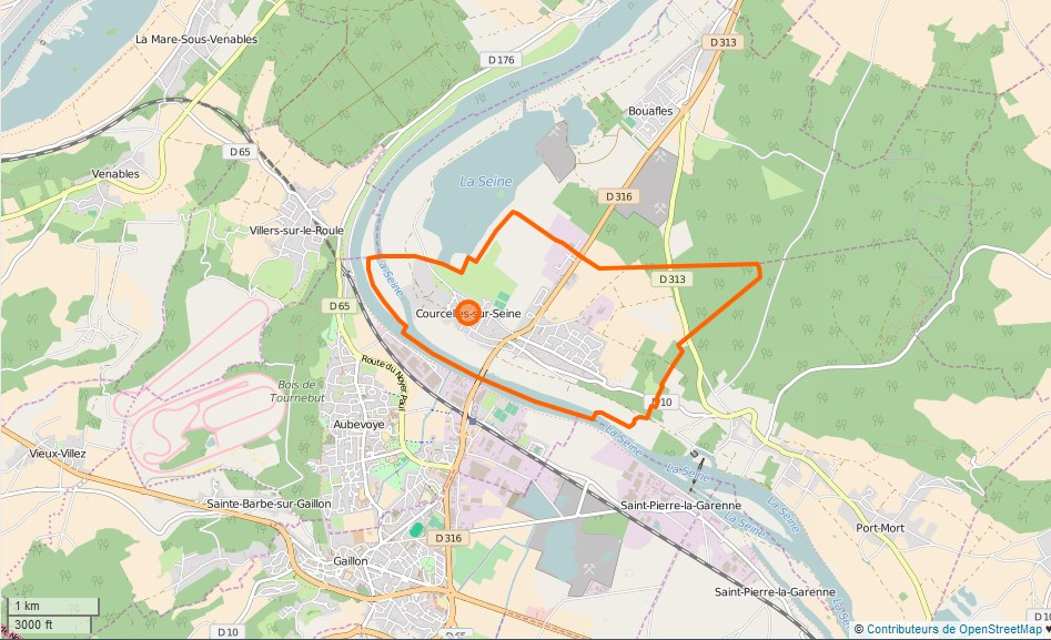 Courcelles-sur-Seine Limite communale This map may be incomplete, and may contain errors. Don't rely solely on it for navigation.